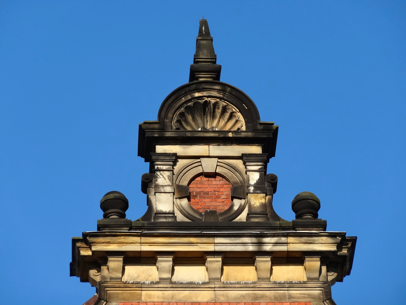 Budynek dawnej dyrekcji Kolei Wschodniej w Bydgoszczy, ul. Dworcowa 63, zbud. 1886-1889, od 2013 r. w gestii Collegium Medicum UMK